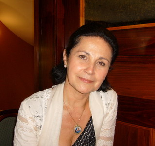 Pitti Katalin opera-énekesnő